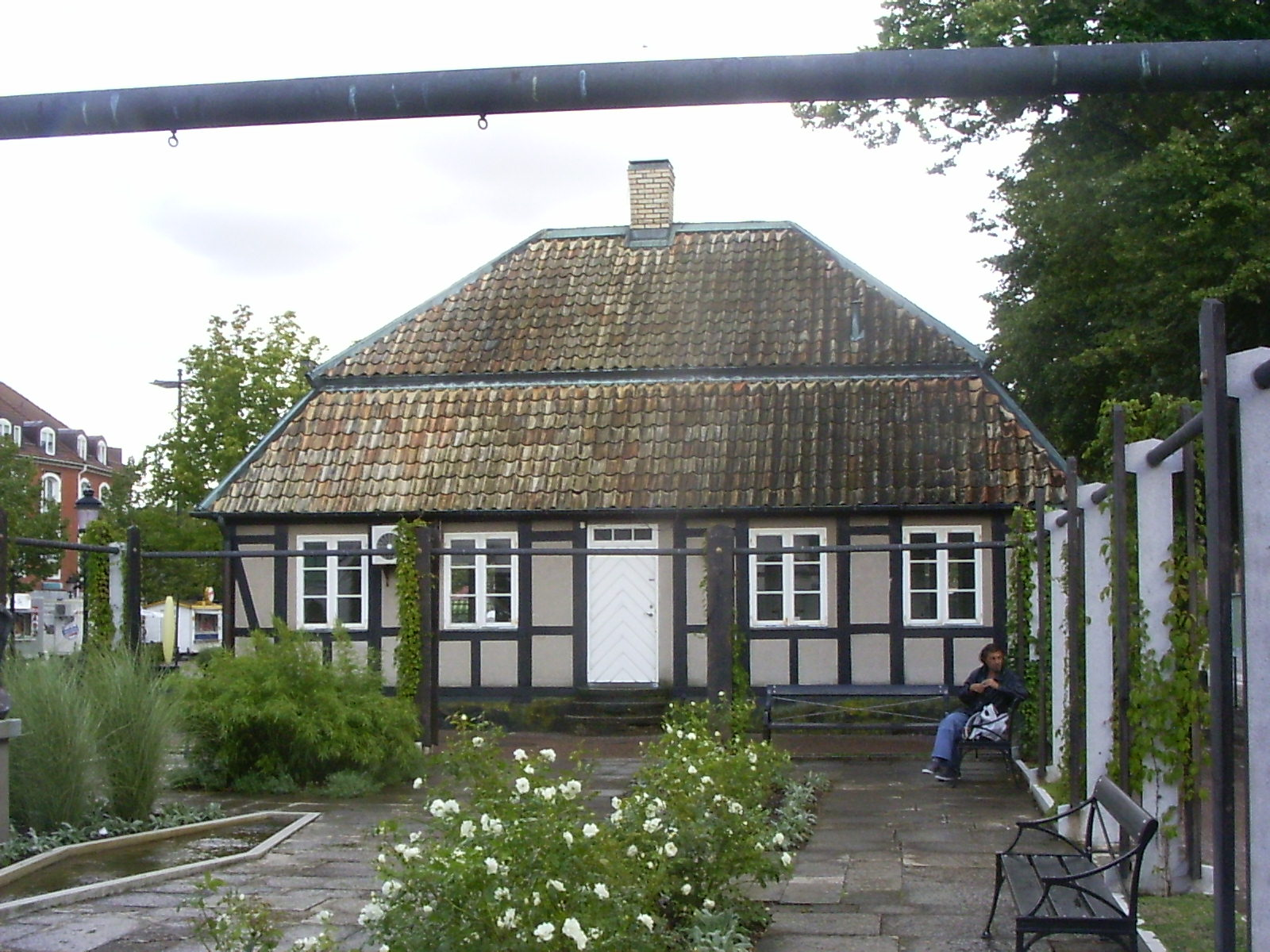 Ängelholm, centrale plein, oude raadhuis, gebouwd in 1775